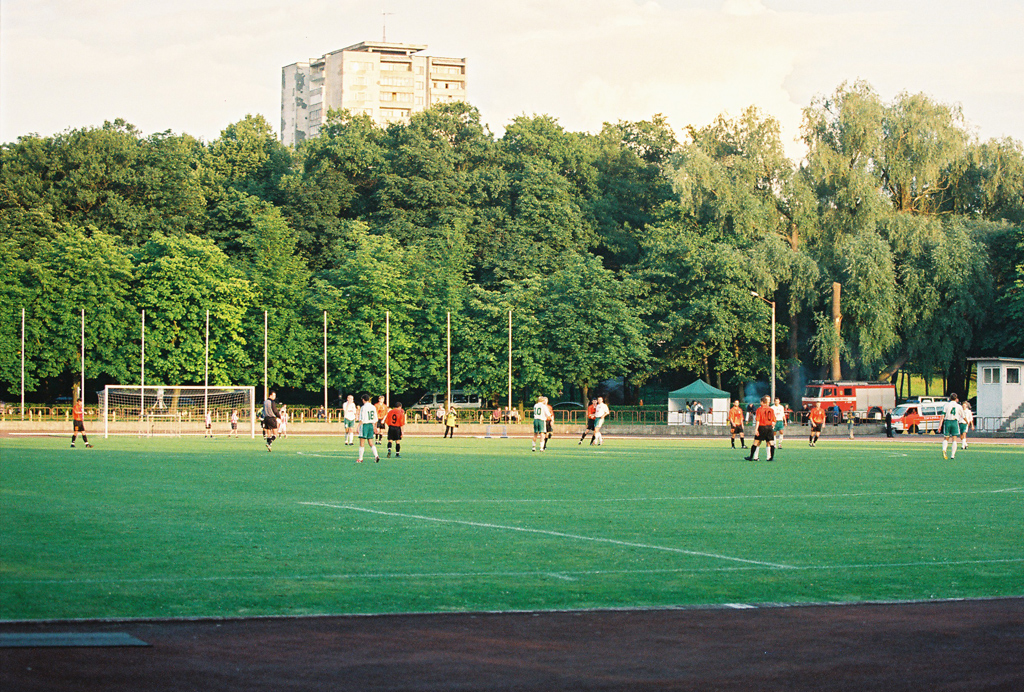 Kadrioru Stadium, TVMK Tallinn vs. Levadia Tallinn